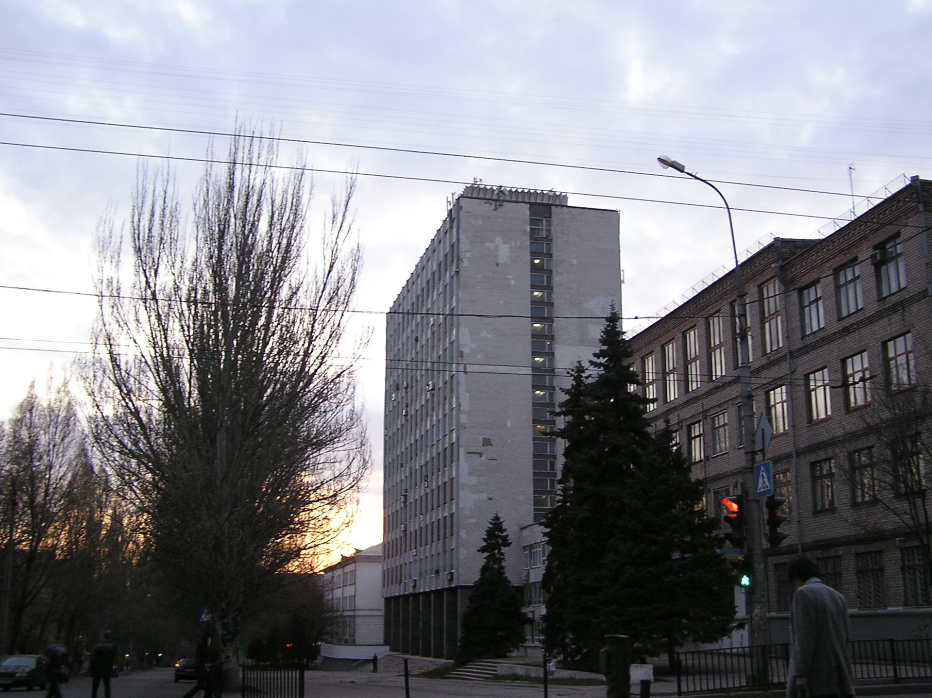 Донецкий национальный университет